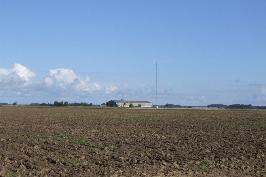 Zaļenieku lidlauka noliktava